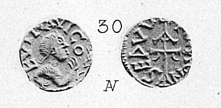 Triens d'Esvres